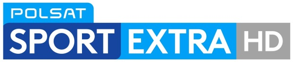 Logo Polsatu Sport Extra HD